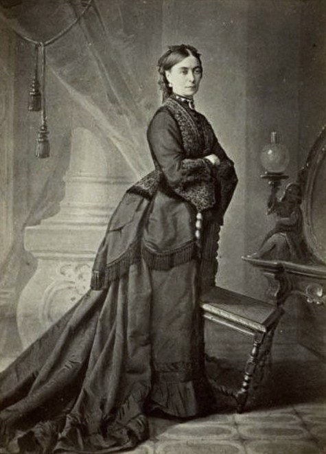 Софья Николаева Батюшкова, ур. Кривцова (1821—1901).